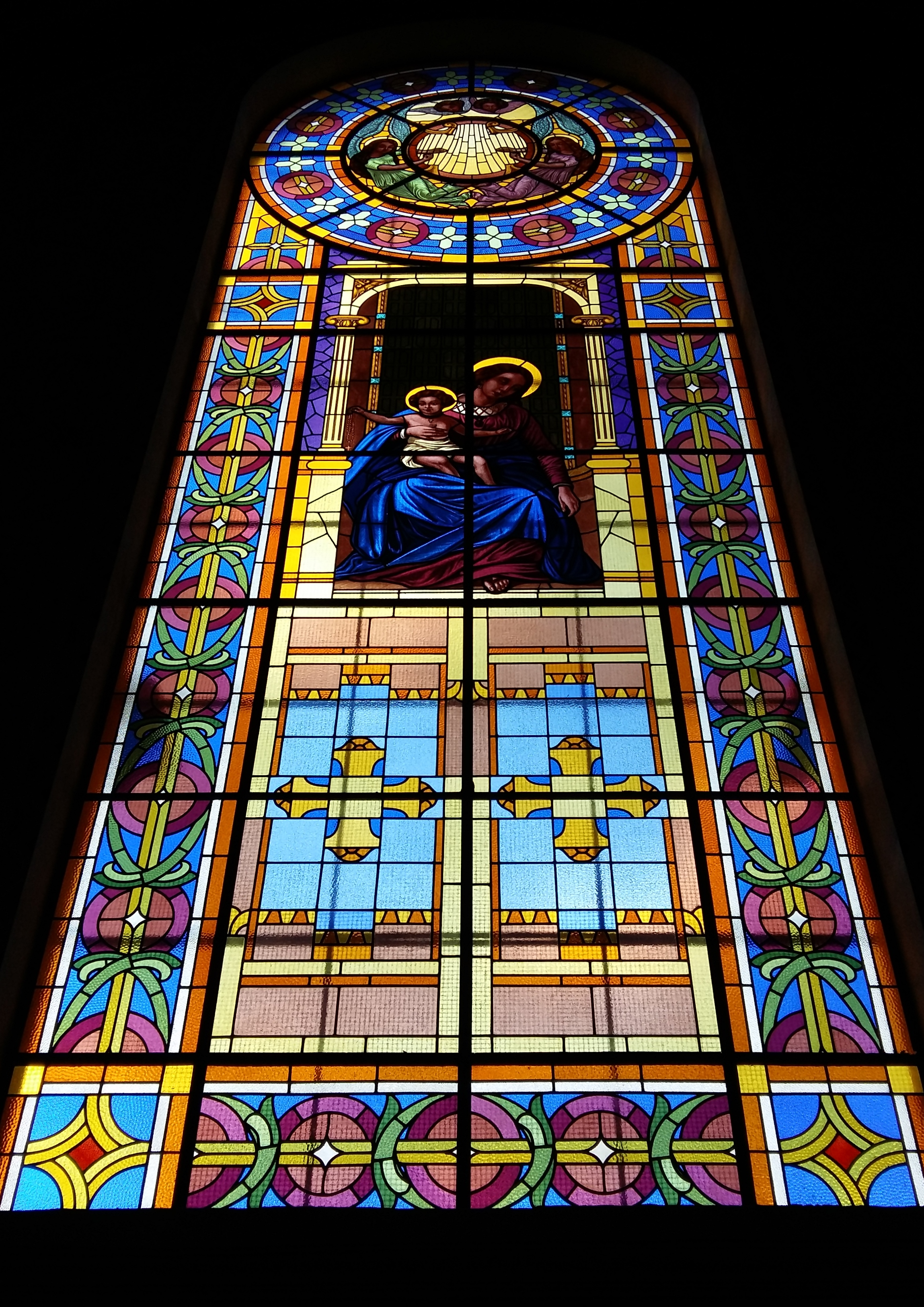 Vitral fotografado de dentro da Catedral, em São Paulo (SP), Brasil.